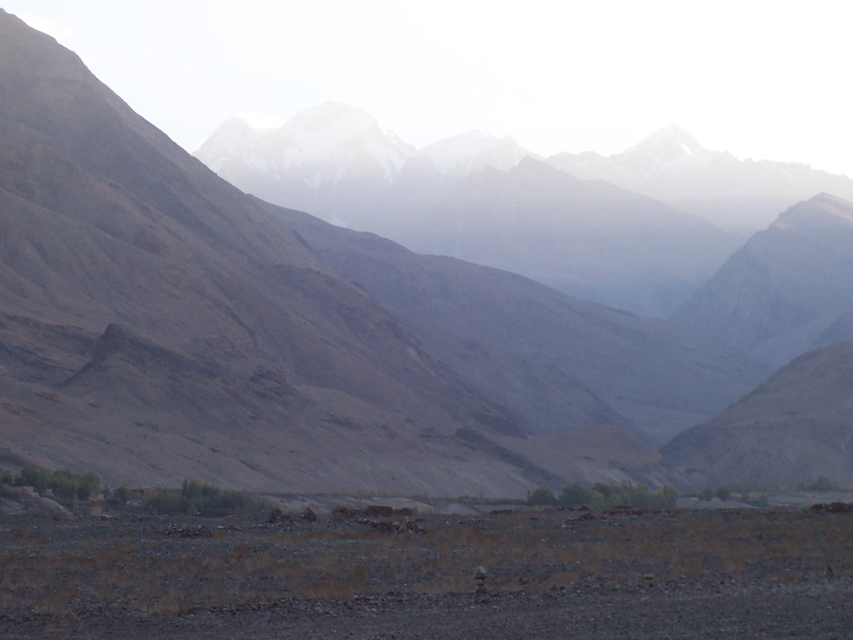 Falk Oberdorf Flughafen Razer